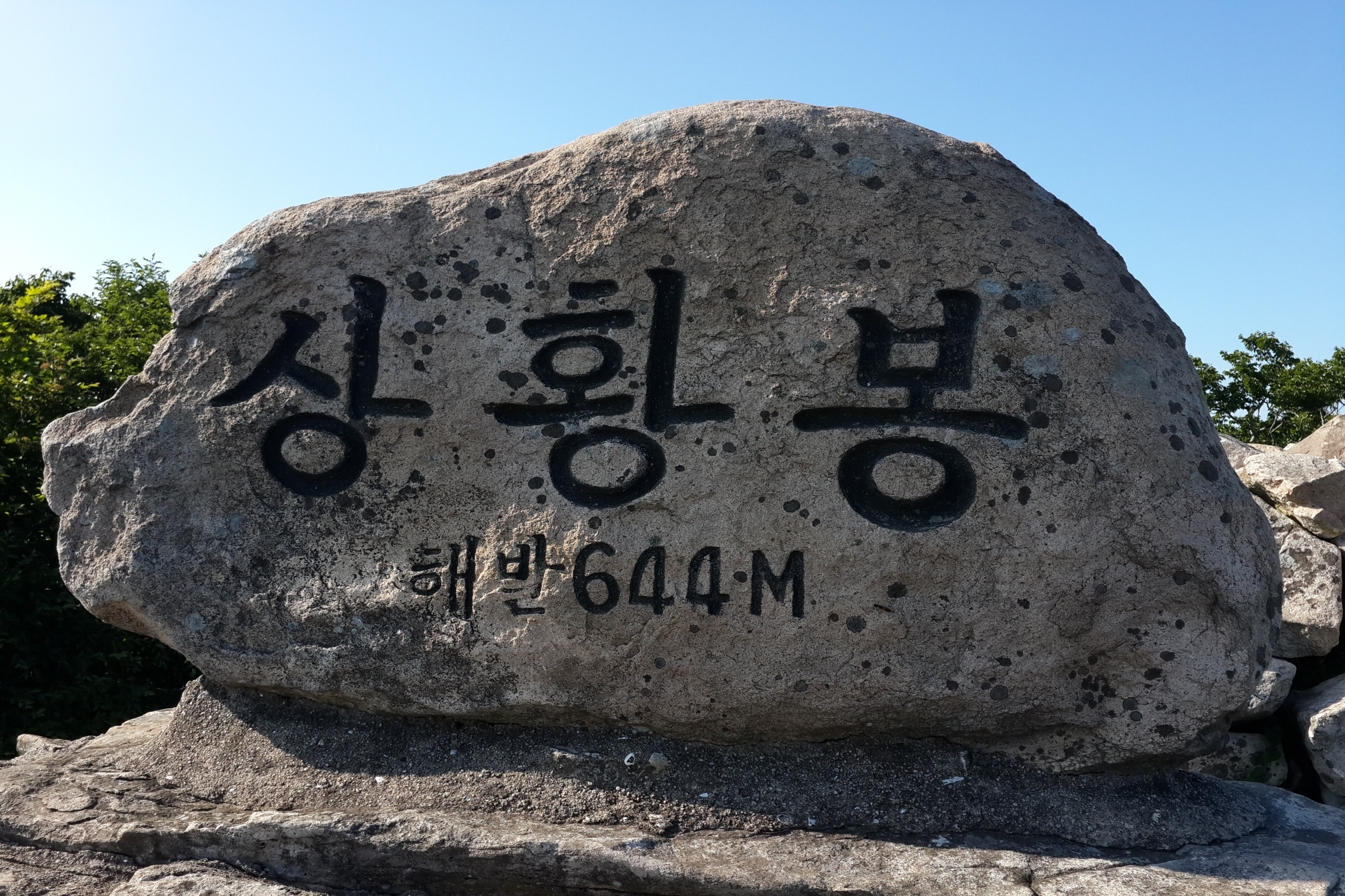 완도군의 주도인 완도섬 오봉산의 가장 높은 봉우리